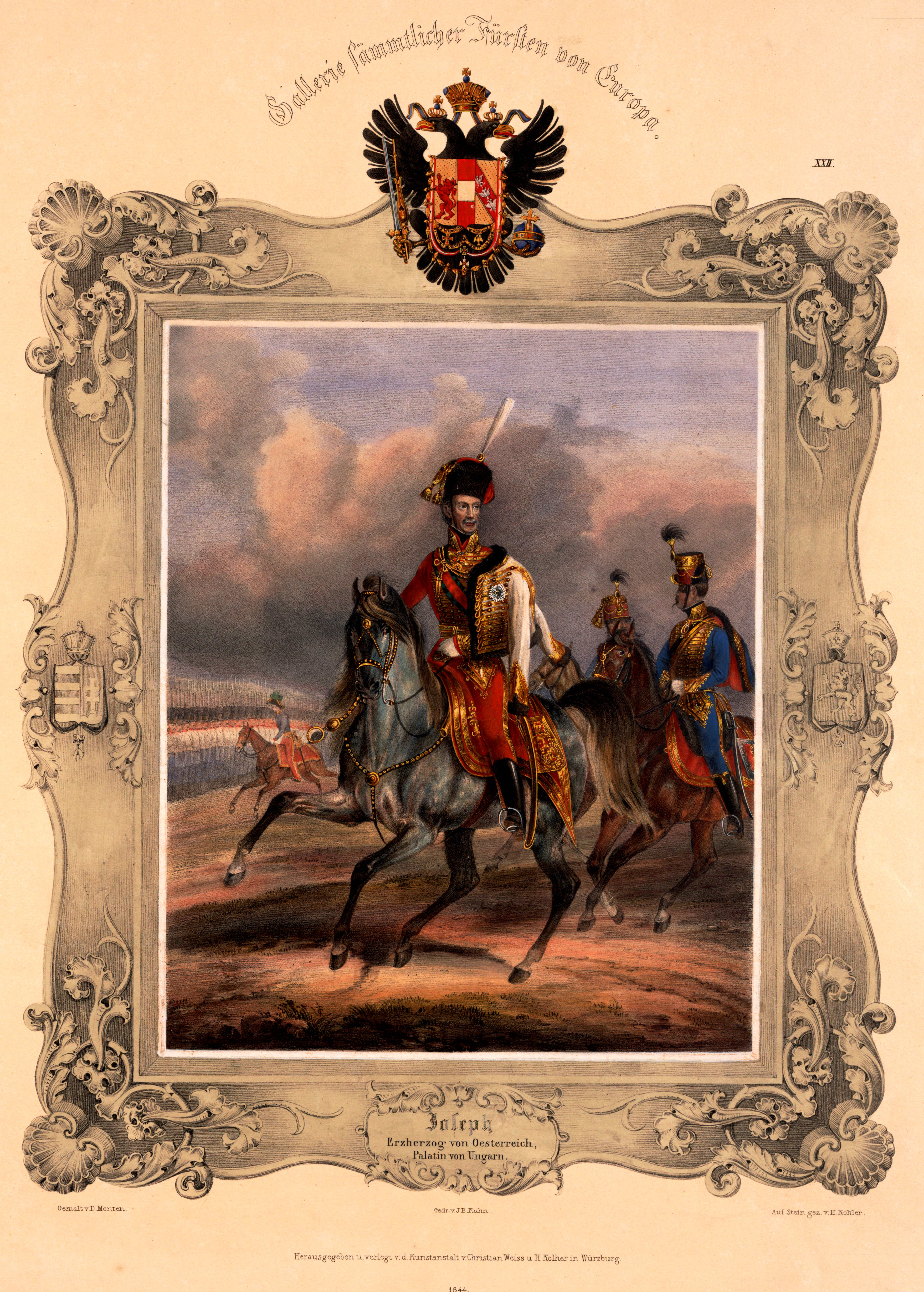 Habsburg József nádor (Erzherzog Joseph Anton Johann Baptist von Österreich; (Firenze, 1776. március 9. – Buda, 1847. január 13.), német-római császári herceg, osztrák főherceg, magyar királyi herceg, császári-királyi tábornagy (k.k. Generalfeldmarschall), 1796-tól haláláig Magyarország nádora, a Habsburg-ház ún. magyar vagy nádori ágának megalapítója.